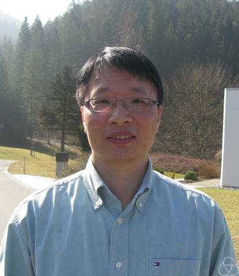 Foto di T. Tony Cai